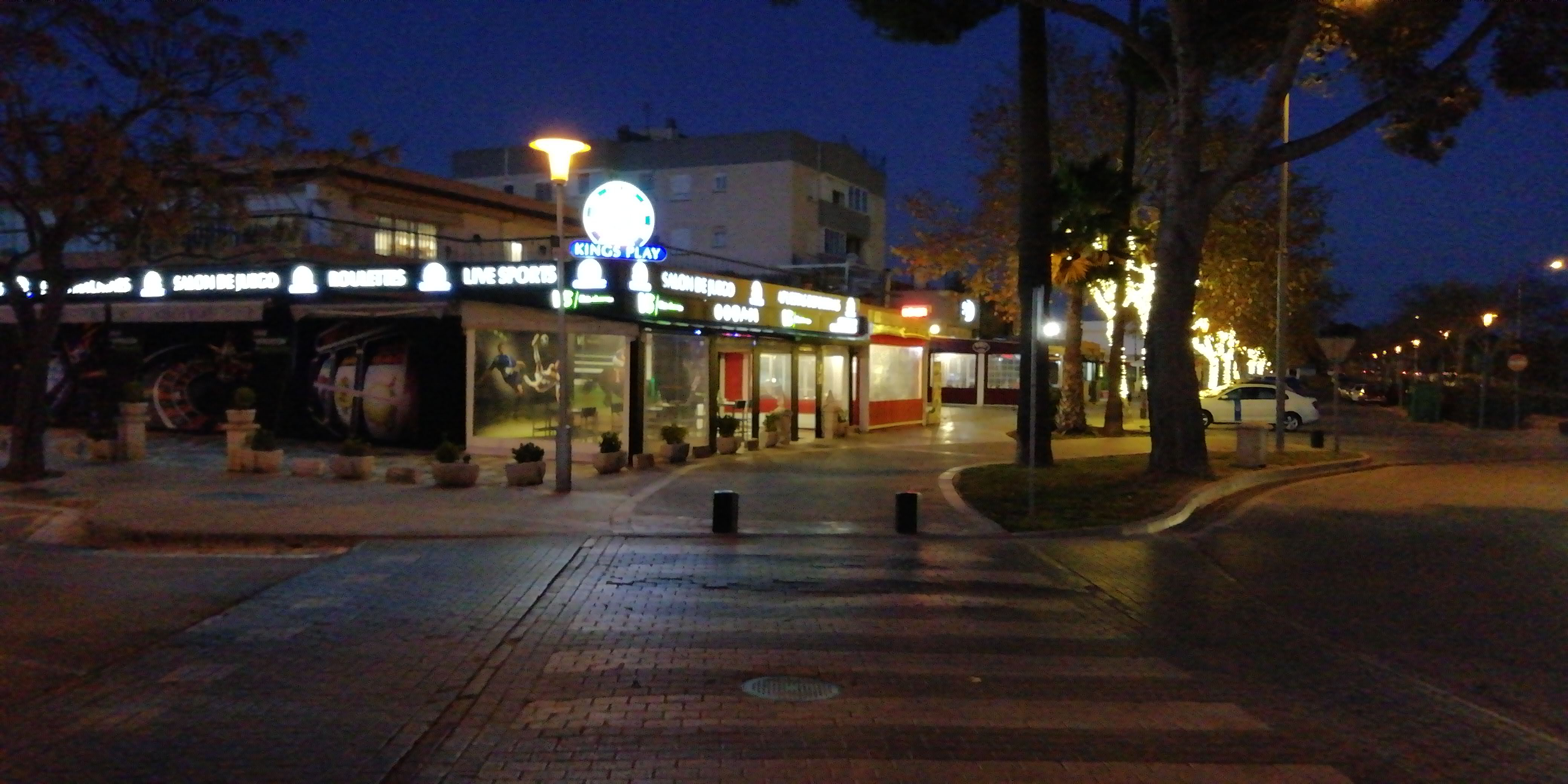 Son Ferrer, Calviá, Mallorca. parte frontal de la urbanización.